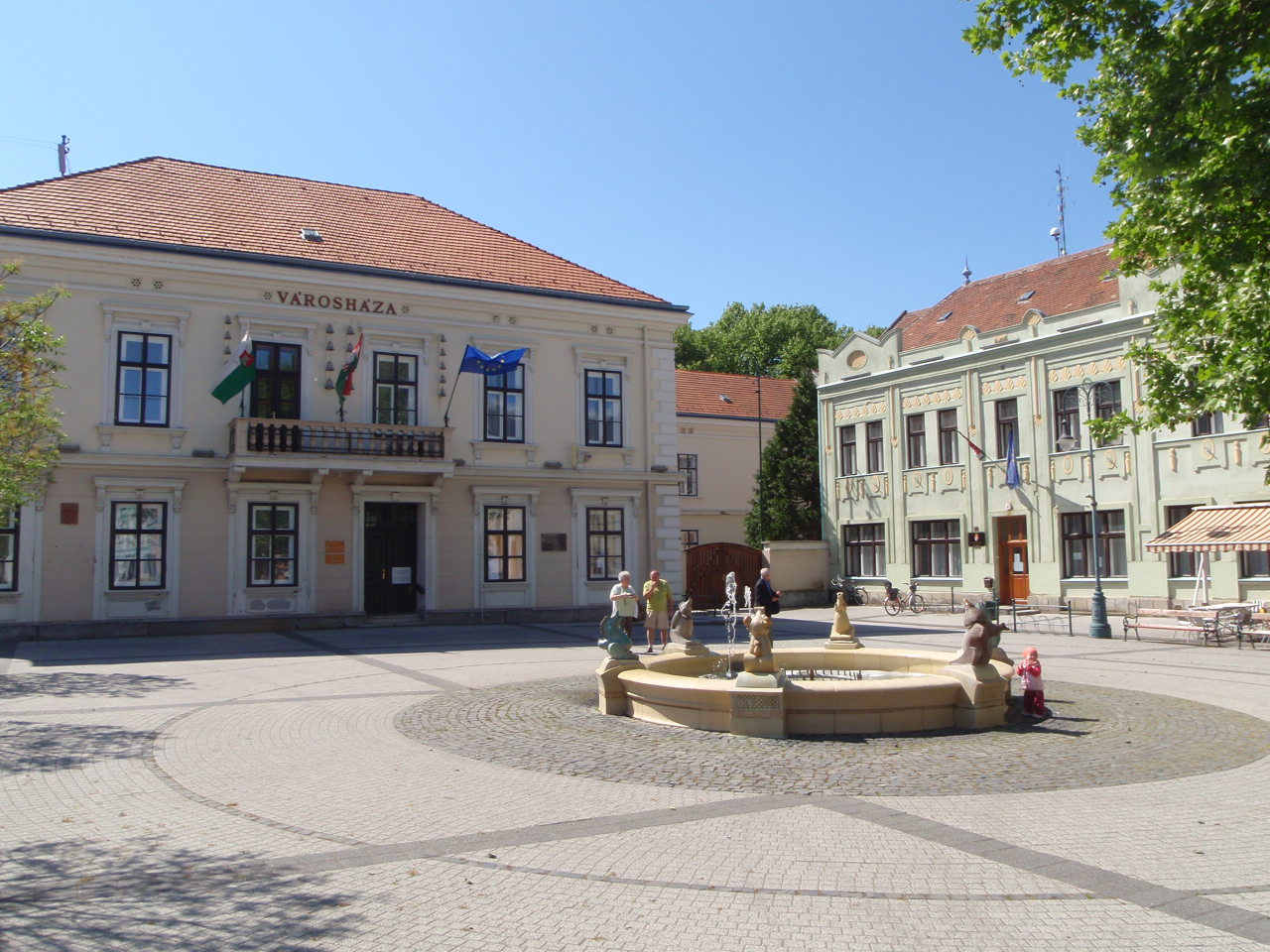 Kossuth tér Sárvár, balra a Városháza